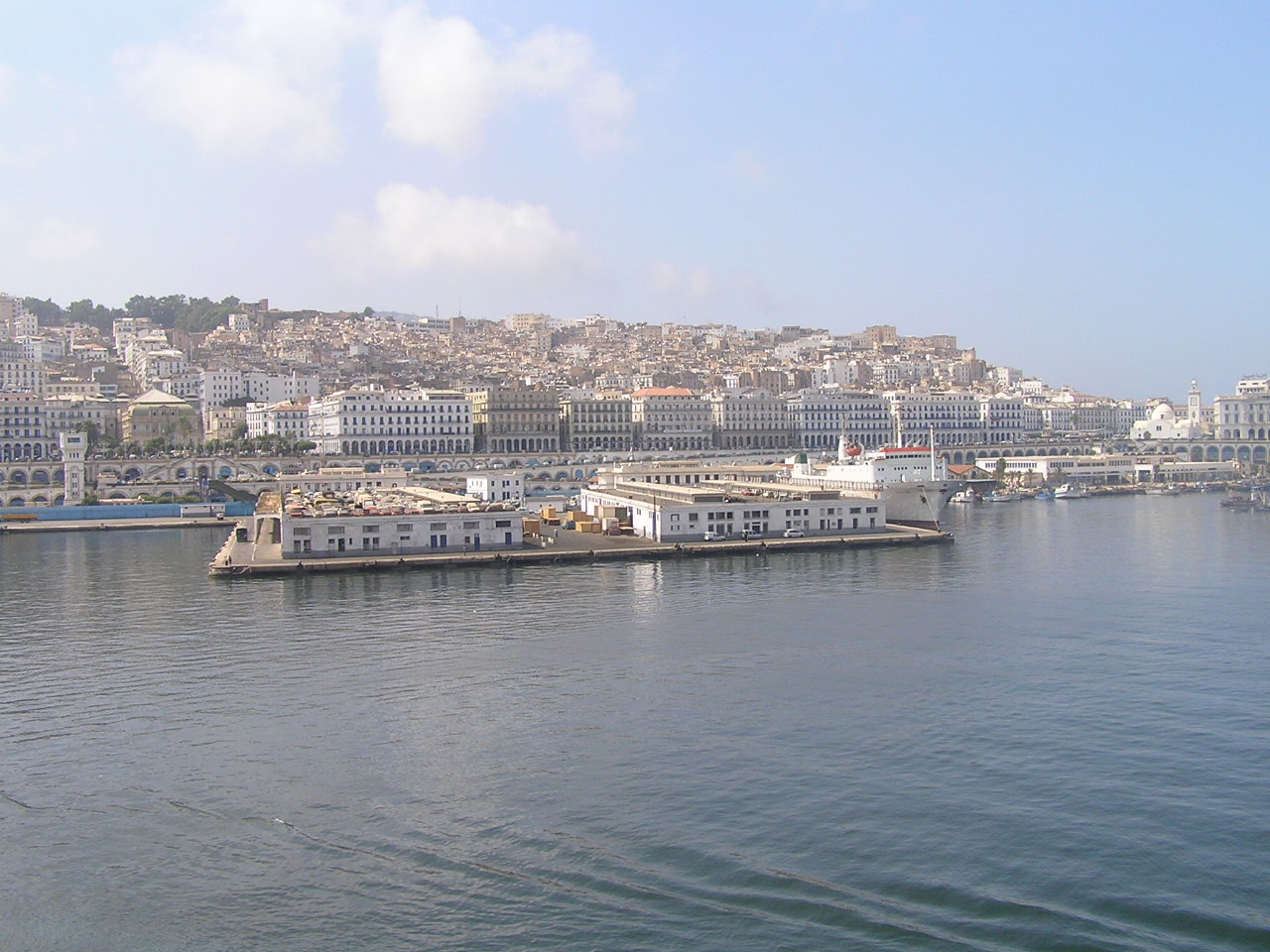 Harbour, Algeri, Algeria2005-08-20_15h31_53